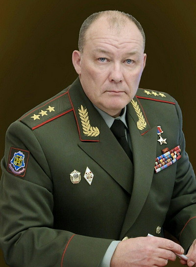 Командующий войсками Южного военного округа Герой Российской Федерации генерал-полковник Дворников Александр Владимирович